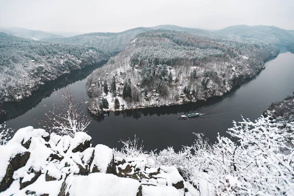 Loď Nepomuk